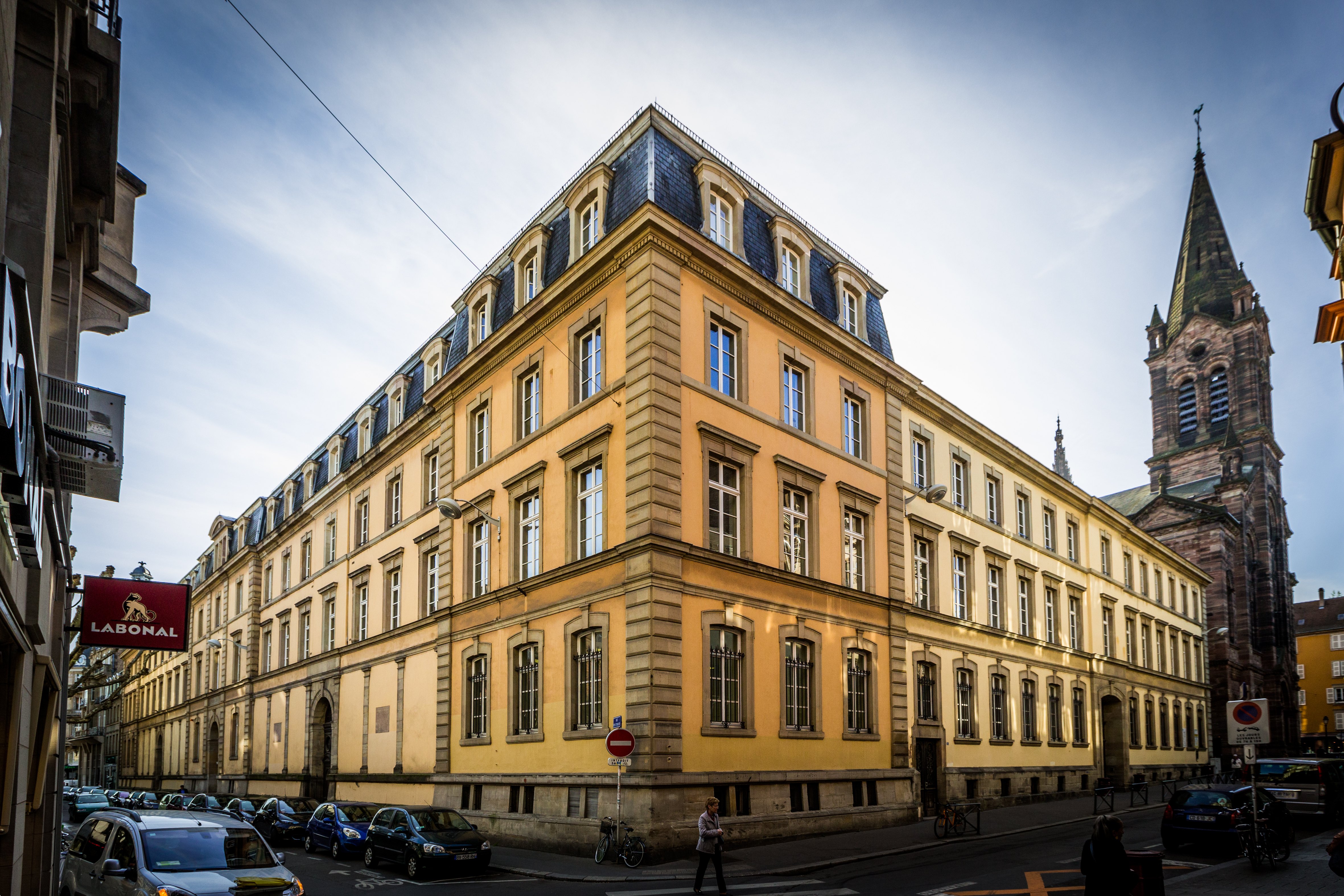 Le Gymnase Jean-Sturm à Strasbourg, avril 2014